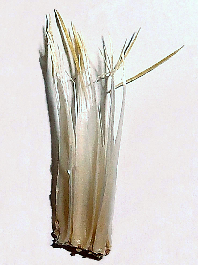 Carlina corymbosa (Cardo cuco) - Páleas acanaladas y laceradas, separadas del receptáculo - Circumvalación Norte circa Cementerio, Águilas (Murcia, España).